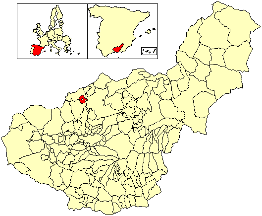 Situación del término municipal de Benalúa de las Villas respecto a la provincia de Granada, en España.